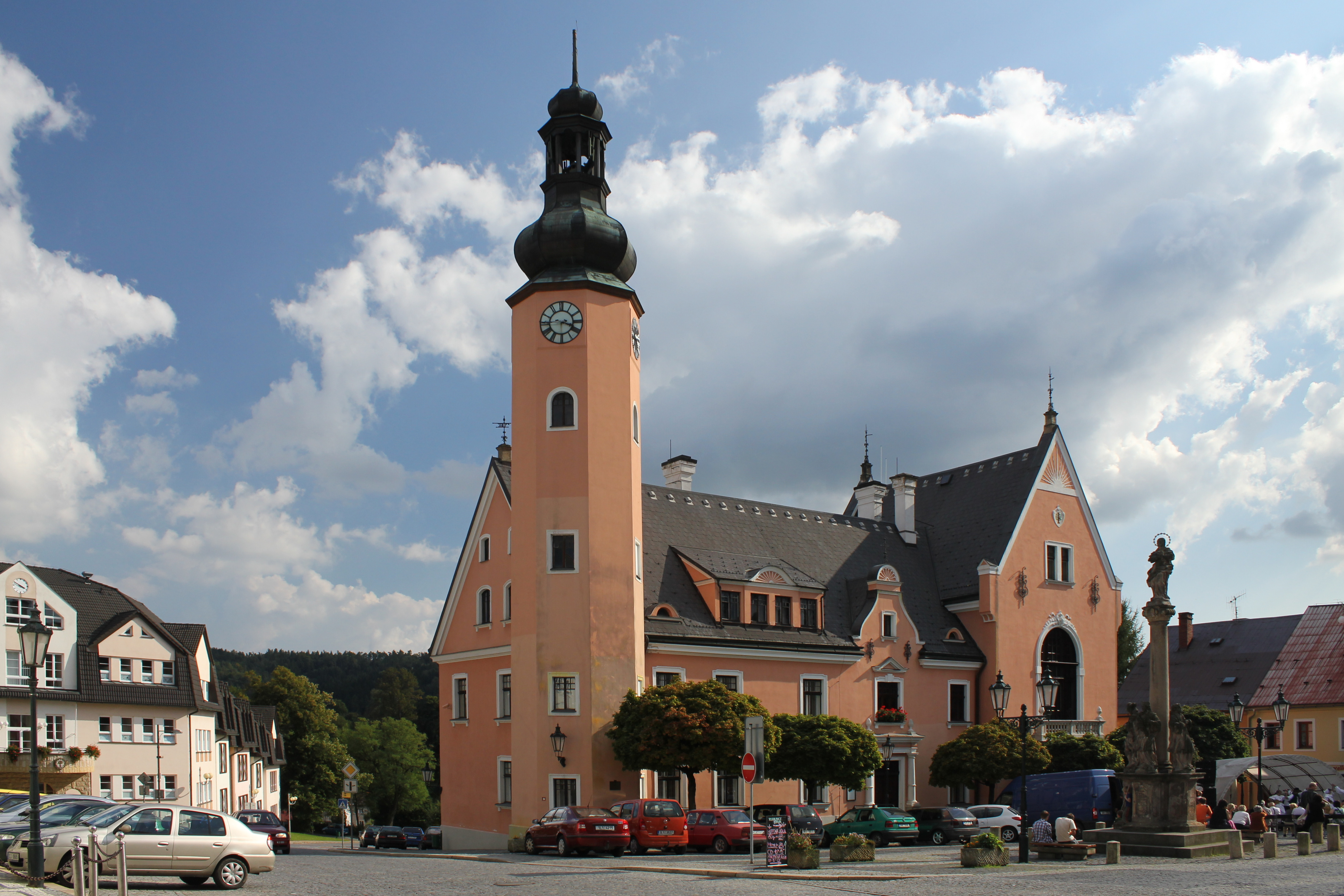 Radnice na náměstí s mariánským sloupem, Český Dub